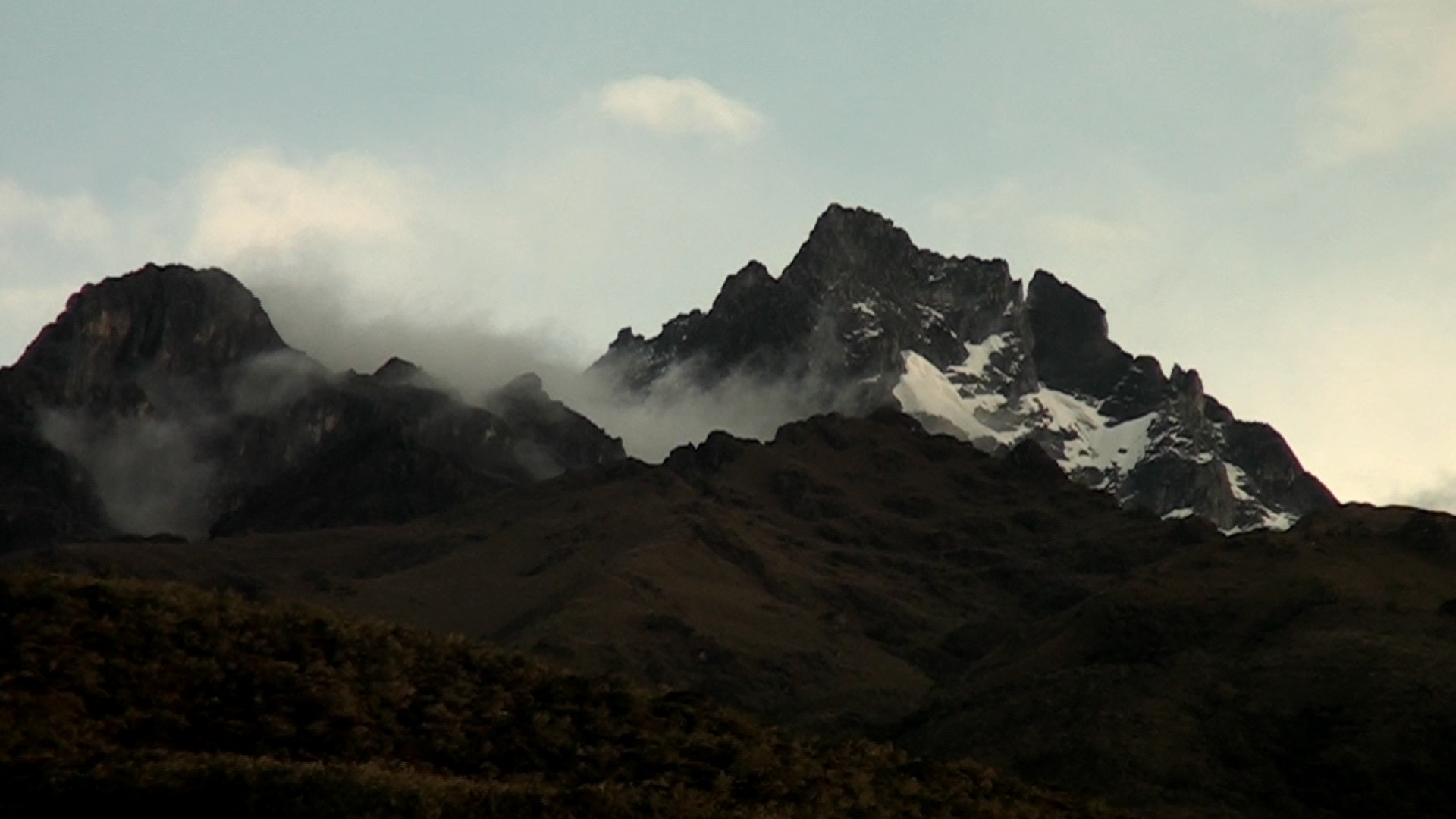 Vista de El Pico Bolivar desde la población de Tabay Estado Mérida